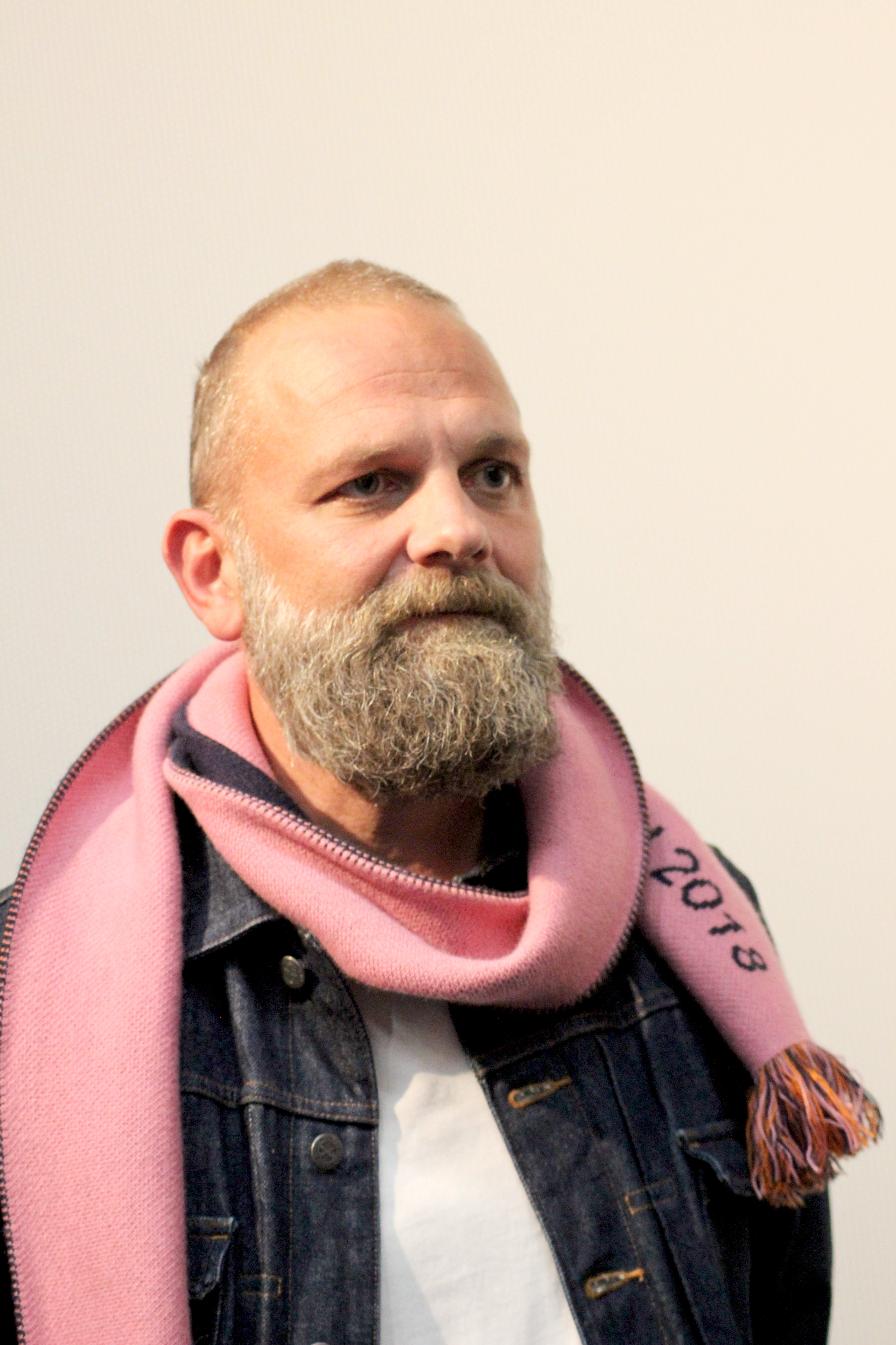 Geboren 1970 in Wien. Er studierte von 1990 - 1995 Psychologie und Malerei an der Universität Wien sowie von 1994 - 1996 Film und Video an der Kunstakademie Düsseldorf bei Nan Hoover. Anschließend absolvierte er von 1996 bis 2001 ein Film- und Fernsehstudium an der Kunsthochschule für Medien in Köln. Aufnahme von 2018.